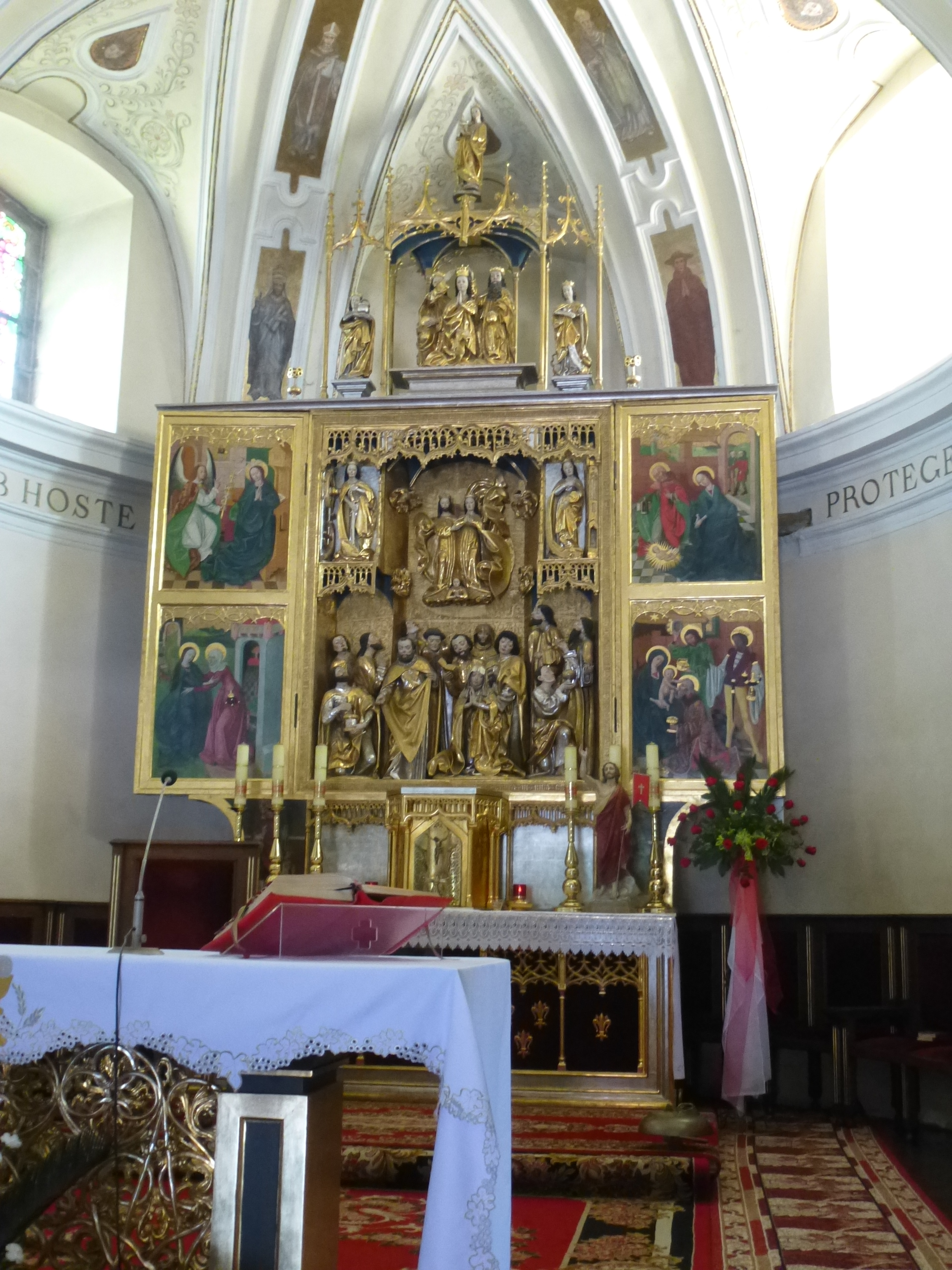 Książnice Wielkie - rzymskokatolicki kościół parafialny pw. Wniebowzięcia NMP, 1673-1680, 1864 (ołtarz główny)